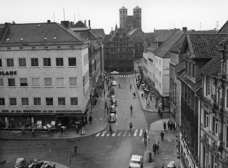 Stadtaufnahmen von Braunschweig Internationales Schulbuchinstitut